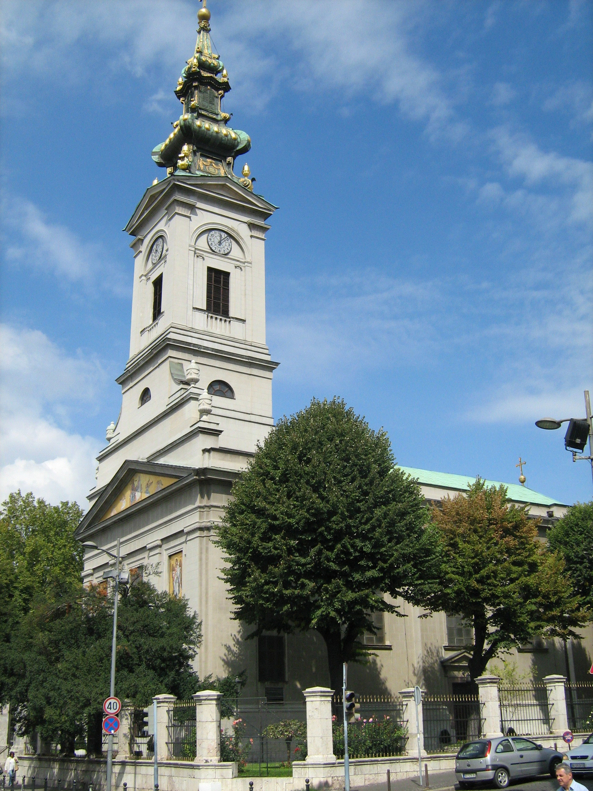 Саборна црква у Београду